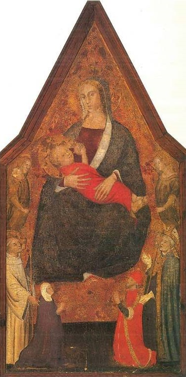 Políptico de la Virgen de la Leche. Ca. 1368-1390. (Museo Diocesano de Córdoba). A los pies de la Virgen María aparecen Alfonso Fernández de Montemayor y su esposa, Aldonza Díaz de Haro.